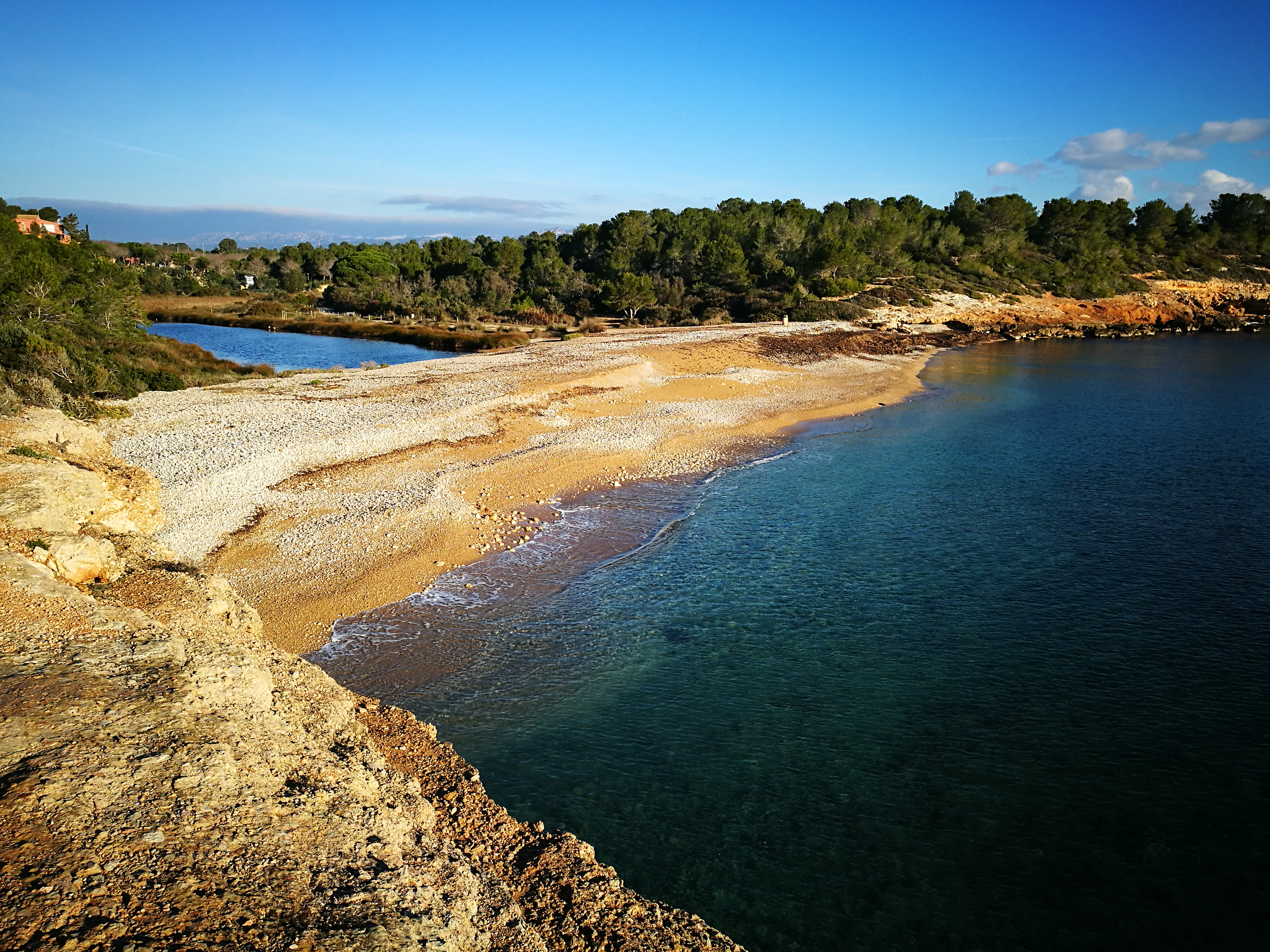 Un belle endroit dans la côte naturelle de l'Ametlla de Mar.